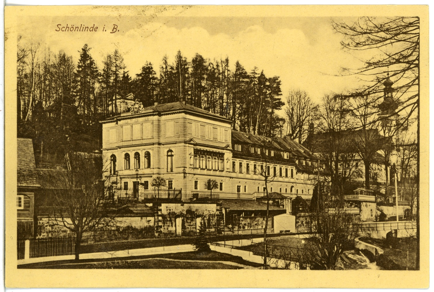 Schönlinde; Ortsansicht. Ehem. Stammsitz der Firma Hielle & Dittrich, bestehend aus dem urspr. Haus Nr. 404/4 (rechts), dem Erweiterungsbau (Mitte) und der Villa "Hirsch" - Familienvilla Carl Dittrich (links). This postcard is from publisher Brück & Sohn in Meißen ( postcard has a unique number 19846 and is available in a higher resolution at the publisher. This images was uploaded in a cooperation project between Wikipedians and the publisher.